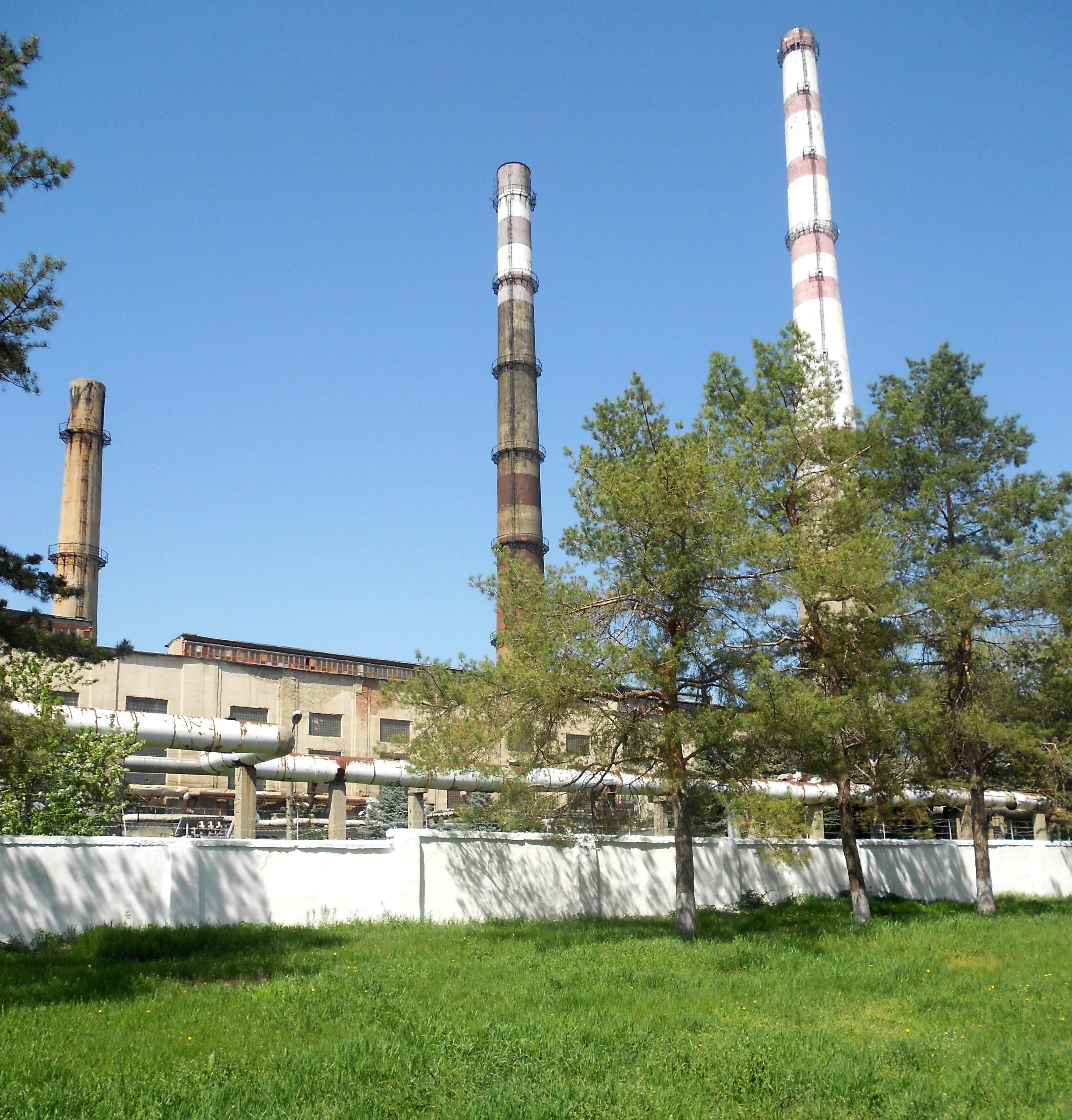 Centrala electrică cu termoficare Nord, Bălți